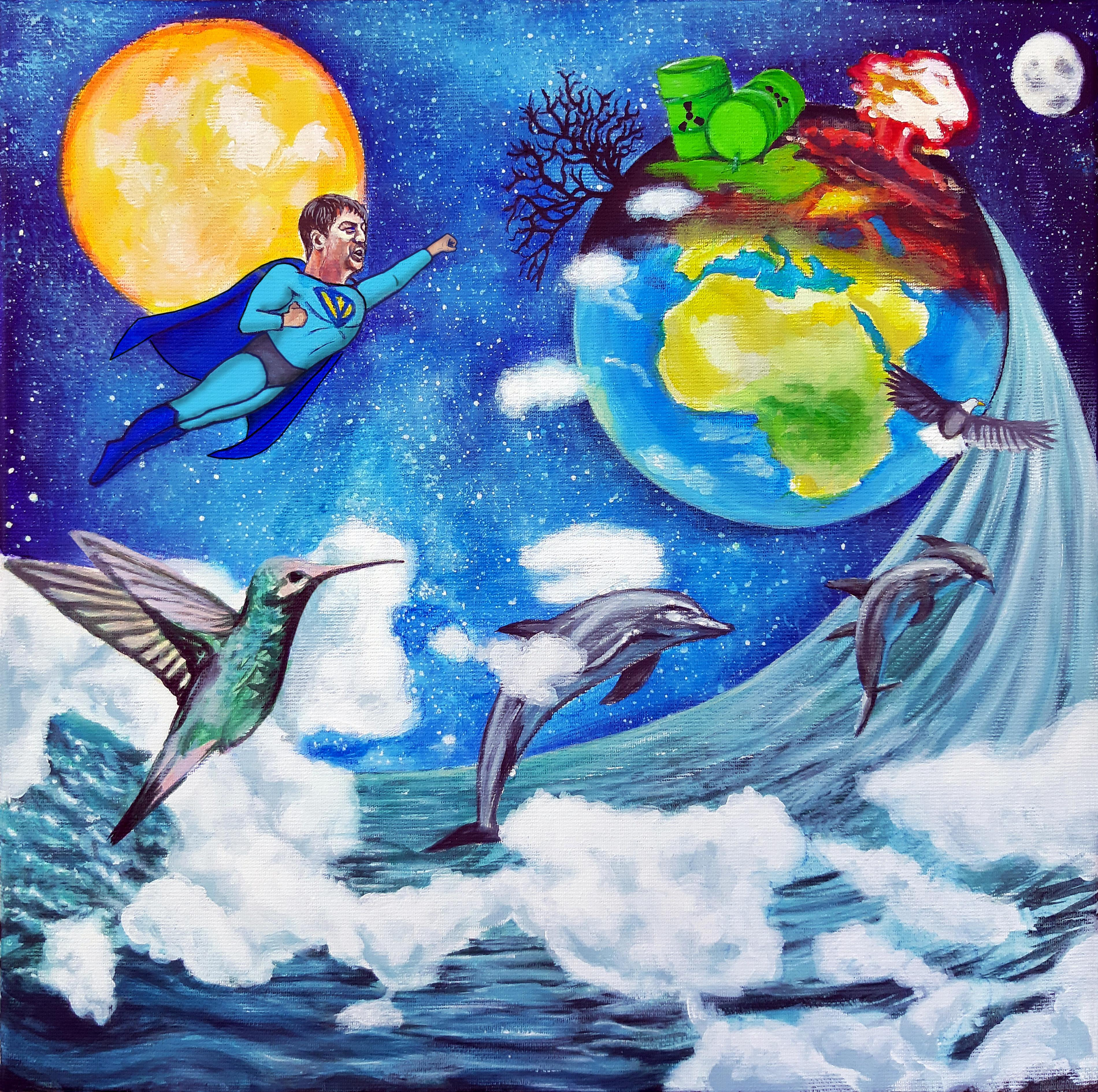 Glasbeni album CD-naslovnica